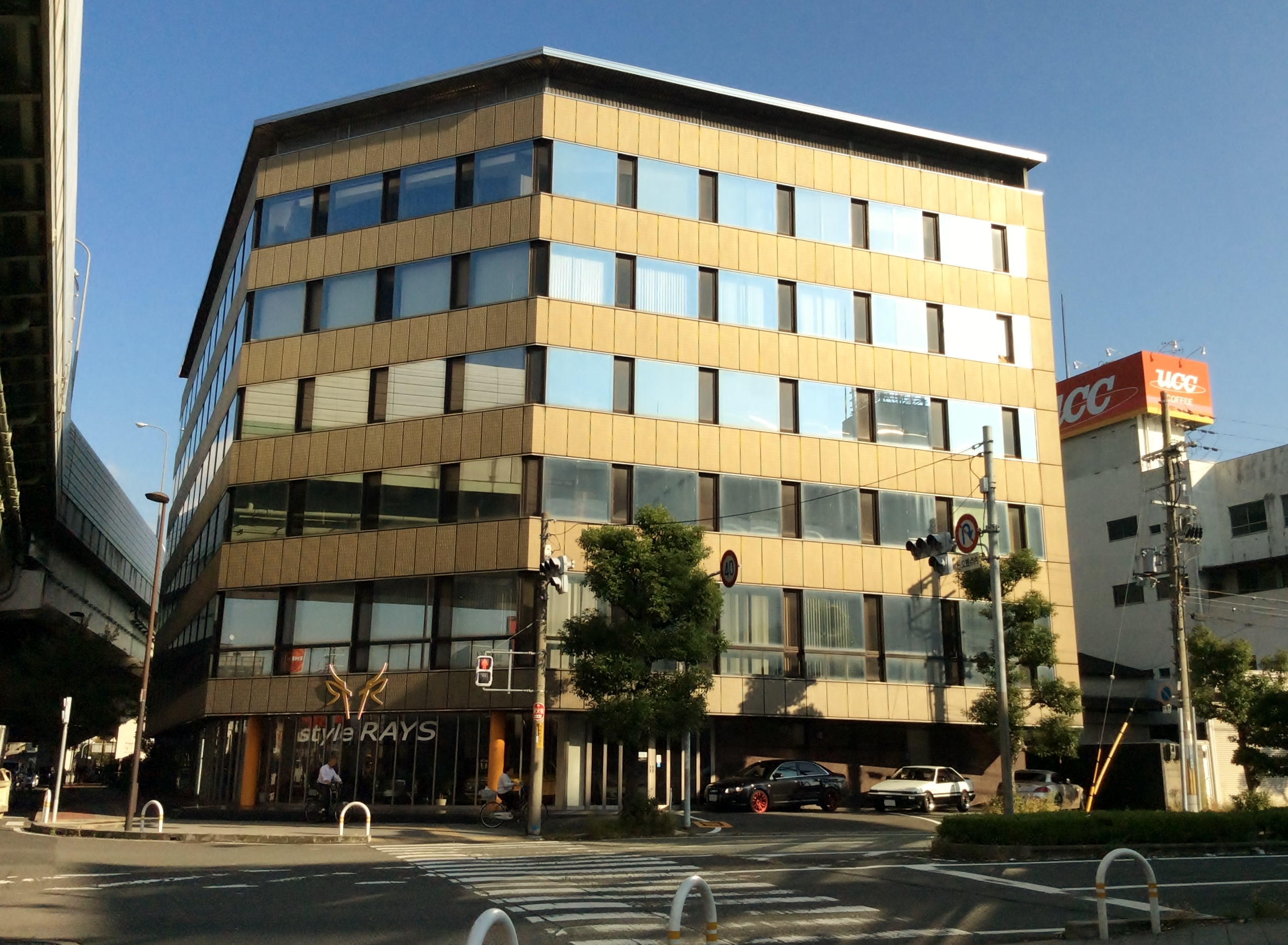 株式会社レイズ本社を撮影